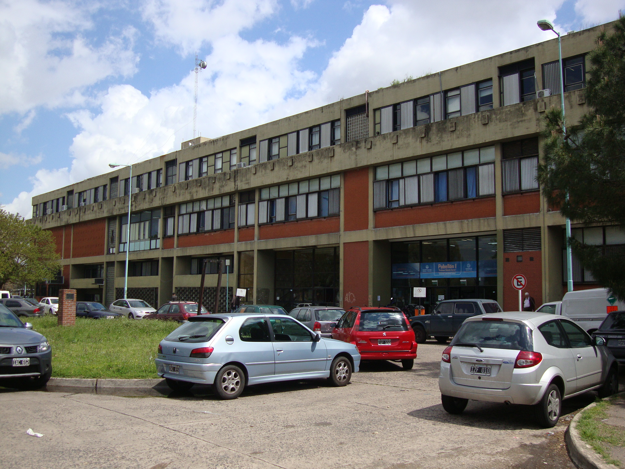 Fachada principal y entrada al Pabellón I "Profesor Rolando García", una de las sedes de la Facultad de Ciencias Exactas y Naturales de la Universidad de Buenos Aires. Fue proyectado por un equipo de la Facultad de Arquitectura y Urbanismo, hacia 1958. Allí se cursan las carreras de Matemática, Física y Meteorología.